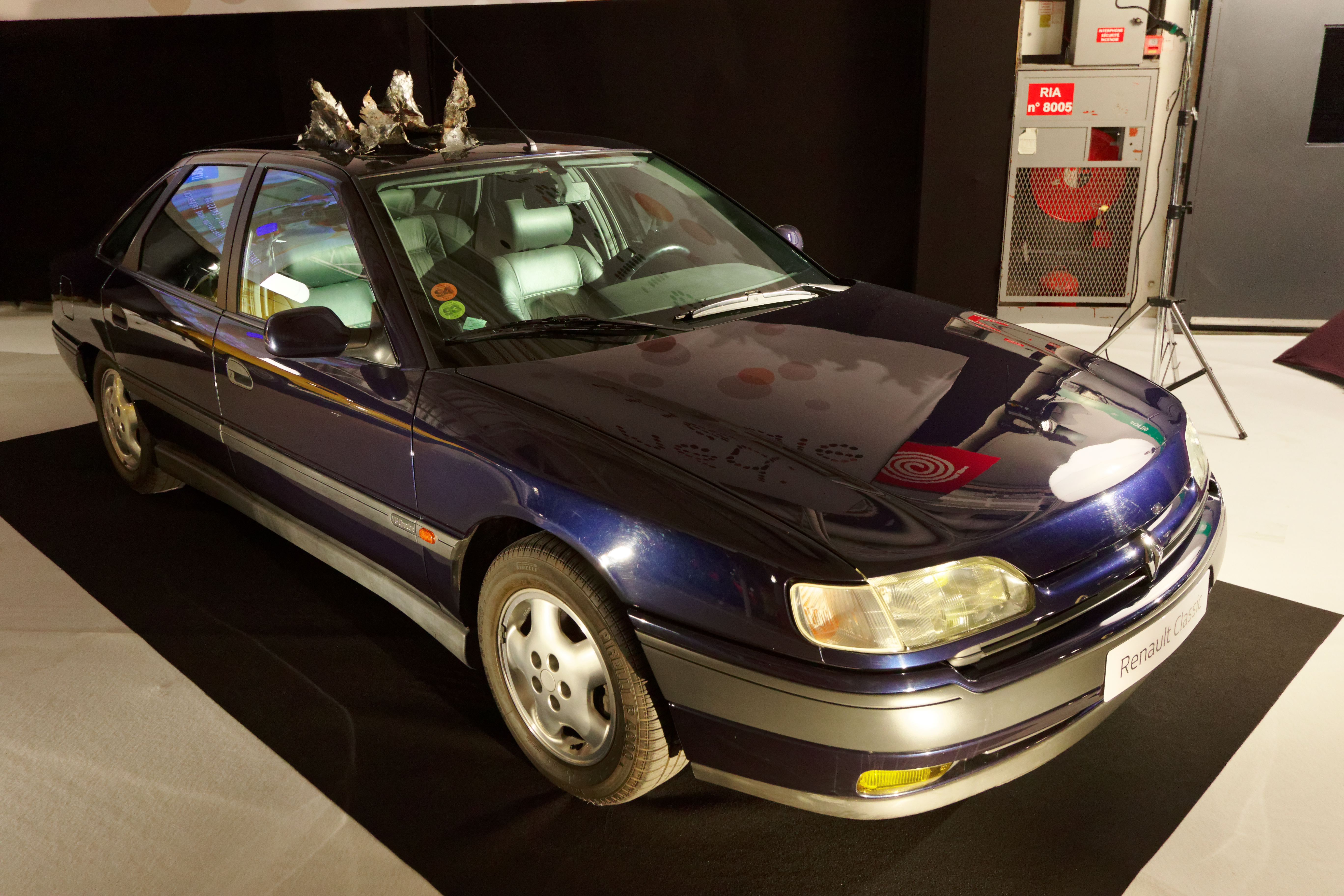 La Renault Safrane de 1993 utilisée sur le tournage du film Les Visiteurs, ici présentée lors du Mondial de l'automobile de Paris, en 2016, dans l'exposition Moteur ! L'automobile fait son cinéma. On peut voir sur le toit un trou provoqué par une explosion, lors d'une scène du film.